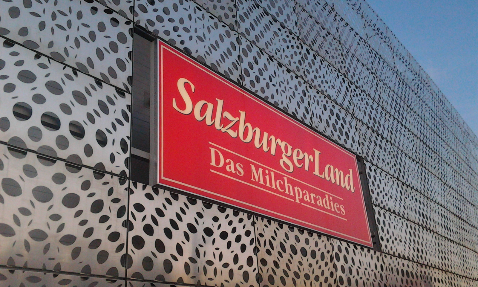 Gebäudefassade des Salzburger Milchhofs (Alpenmilch Salzburg) mit dem bis 2013 angebrachten Logo der Produkte in Salzburg-Itzling. Danach wurde die Tafel durch eine mit dem neuen Produktlogo des Unternehmens ersetzt.